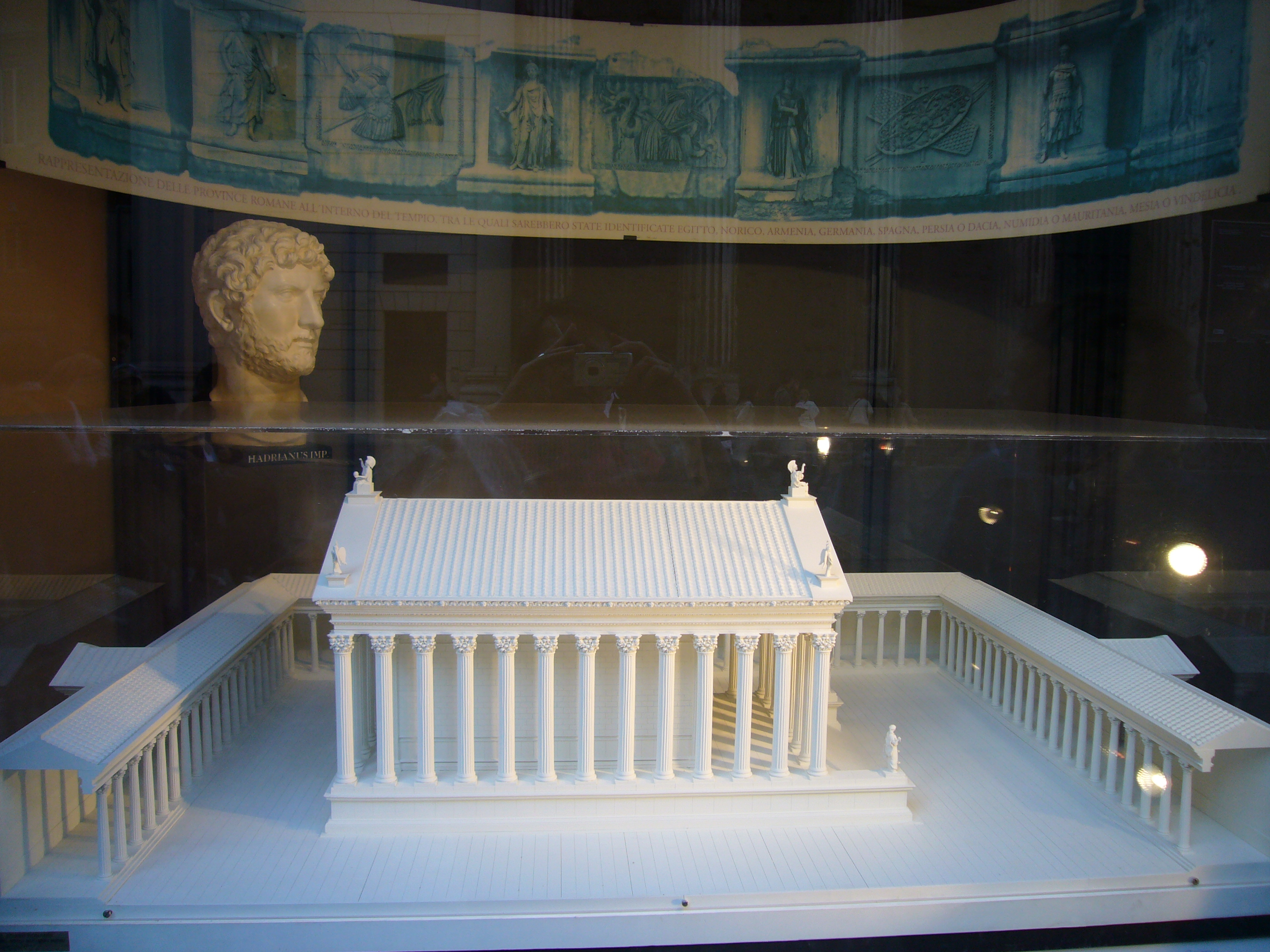 Roma, Tempio di Adriano a piazza di Pietra: maquette.